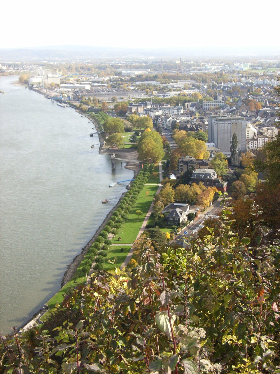 Bildbeschreibung: ...Rheinanlagen in Andernach vom Krahnenberg aus Rechts im Bild: Silogebäude der Friedrich_Weissheimer_Malzfabrik Fotograf/Zeichner: ...Irmgard Siemieniec Datum: ...Oktober 2005 Genehmigung: ...liegt vor